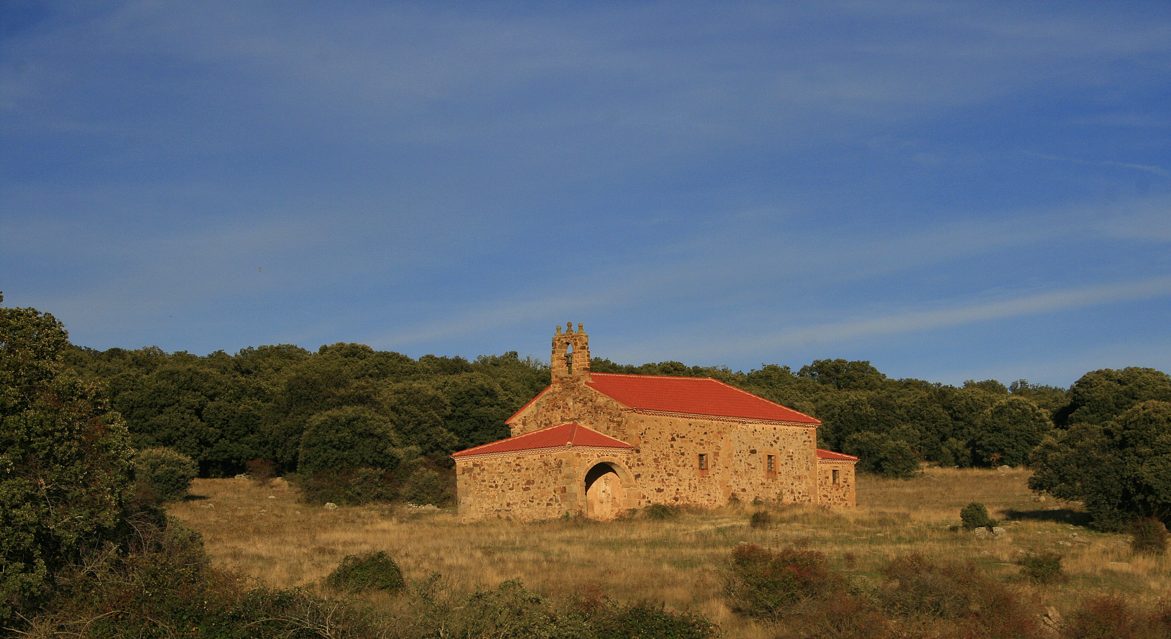 Ermita de la Soledad.Cortos.Soria.